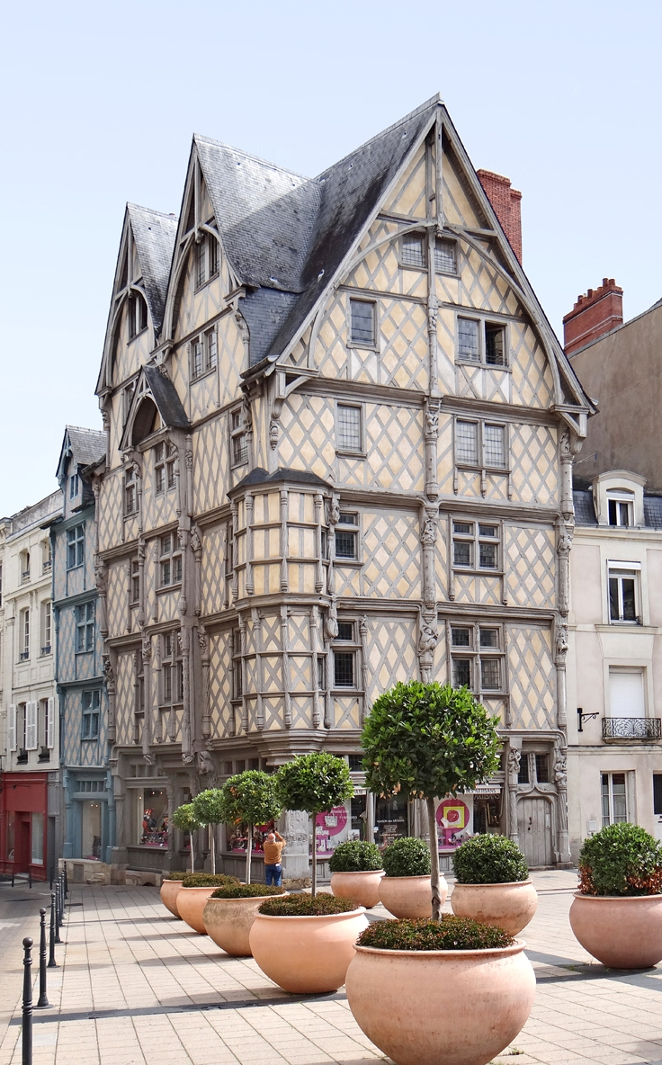 Vue d'ensemble de la maison d'Adam à Angers Située sur la place Sainte-Croix, près de la cathédrale d'Angers, la maison d'Adam est une maison à pans de bois, typique de l'habitat bourgeois commerçant de la fin du Moyen-Age (elle a été construite lors de la décennie 1490). Elle doit son nom aux sculptures d'Adam et Eve, aujourd'hui disparues qui encadraient l'Arbre de la Connaissance, toujours visible. La maison des artisans occupe le rez-de-chaussée Notice monument historique Photo Annie Dalbéra